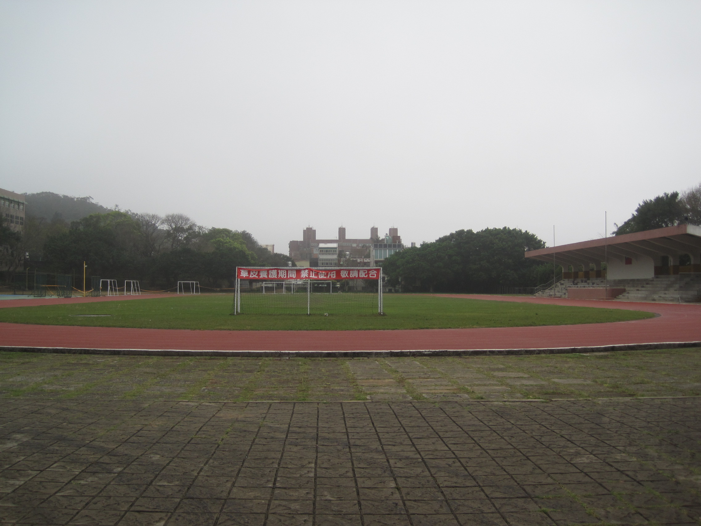 新竹高中操場